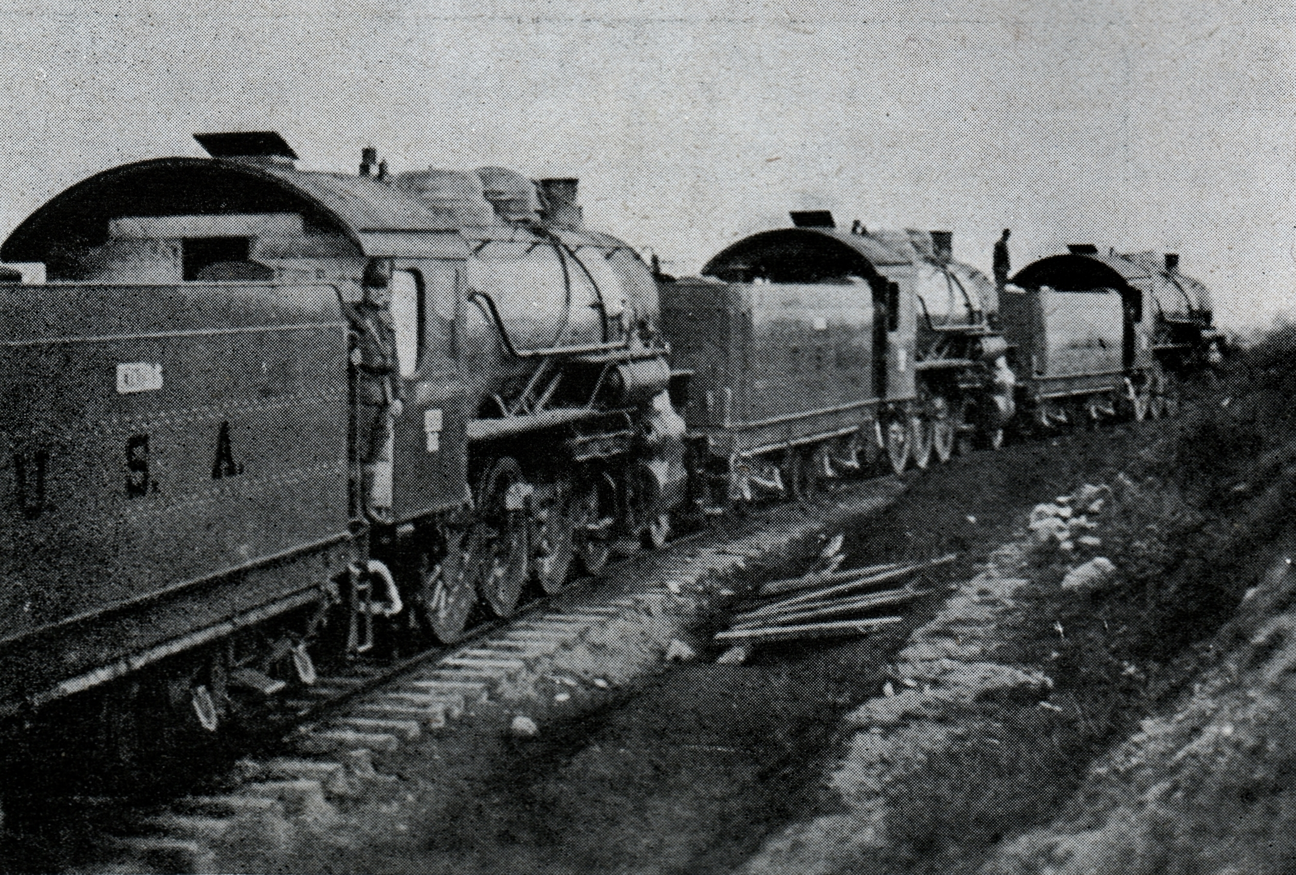 Scan of L'ILLUSTRATION No 3908 26 Janvier 1918. Locomotives américaines en France.